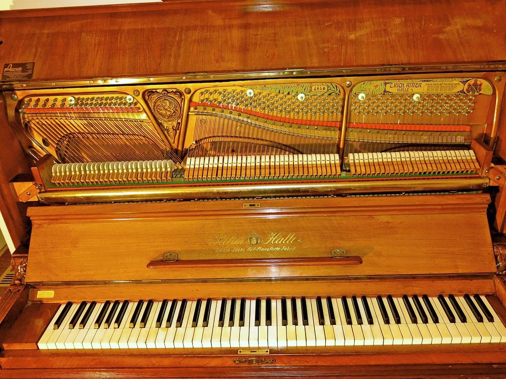 Klavier aus der Grossh. Sächs. Hof Pianoforte Fabrik, gebaut von Willi Ritter 1900, hier obere Mechanik unverdeckt.